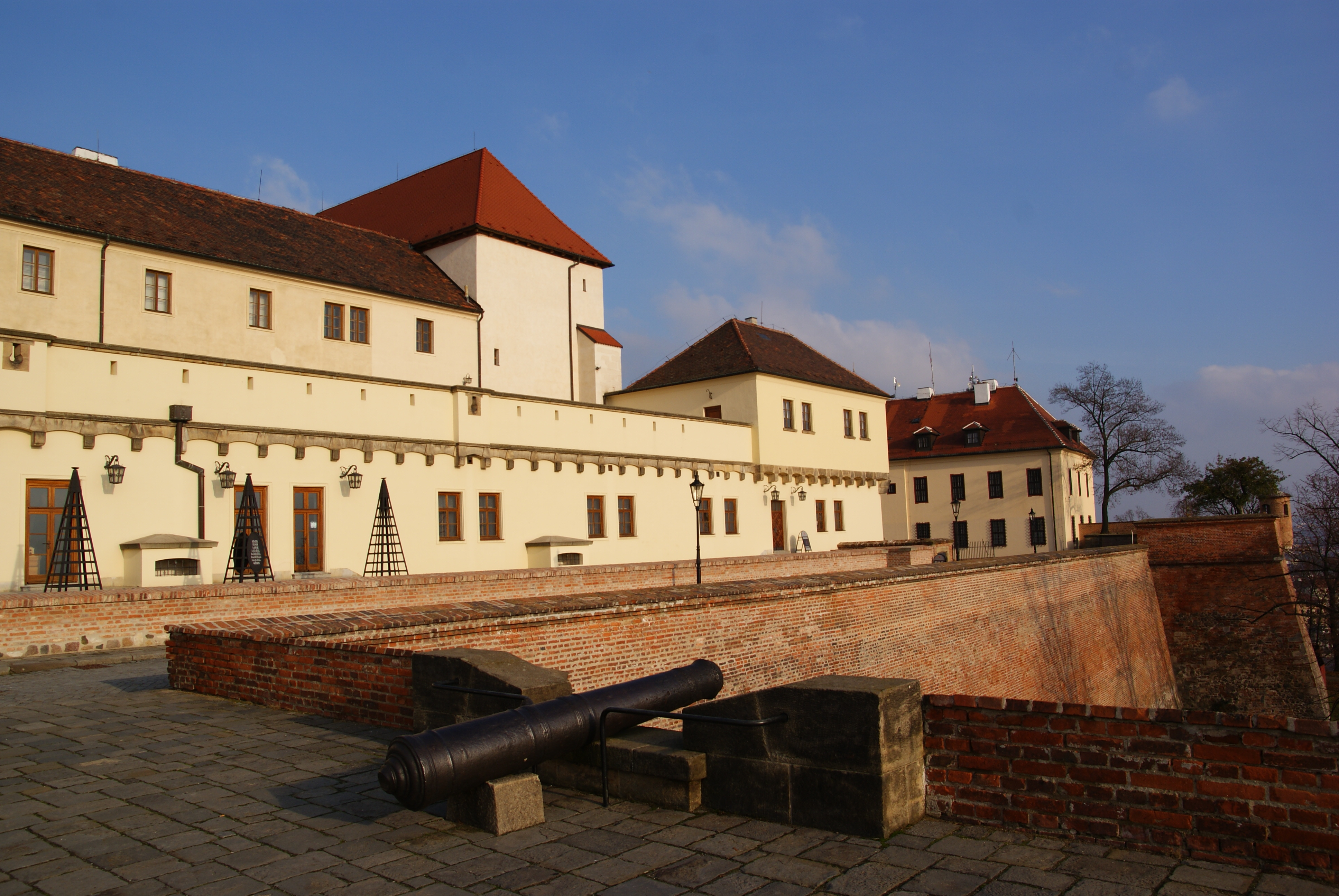 Hrad Špilberk (Brno), Brno - město 208, Brno